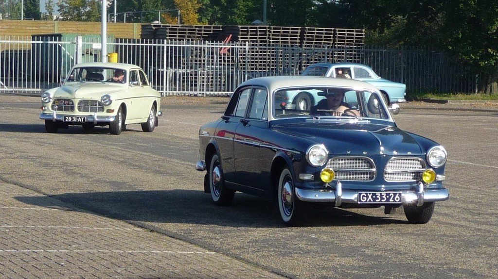 GX-33-26 | 28-31-AT Volvo Klassieker Beurs 2008